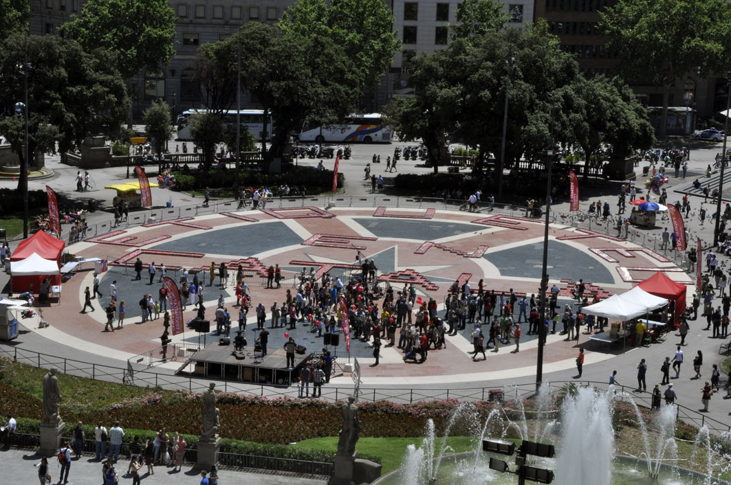 La Plataforma per la Llengua ha denunciat que grans empreses com Coca-Cola vulneren expressament la llei que garanteix el dret de rebre l'etiquetatge en català. Per denunciar això i també la responsabilitat de l'administració en aquesta qüestió, va convocar a la ciutadania a la plaça de Catalunya de Barcelona el 31 de maig del 2014 per crear un gran mural amb llaunes de Coca-cola on s'hi va poder llegir "ETIQUETEU EN CATALÀ!". El #repteCocacola va ser tot un èxit de participació ja que va doblar el número de llaunes que s'havia demanat, recollint-se finalment un total 40.000 llaunes per l'etiquetatge en català!